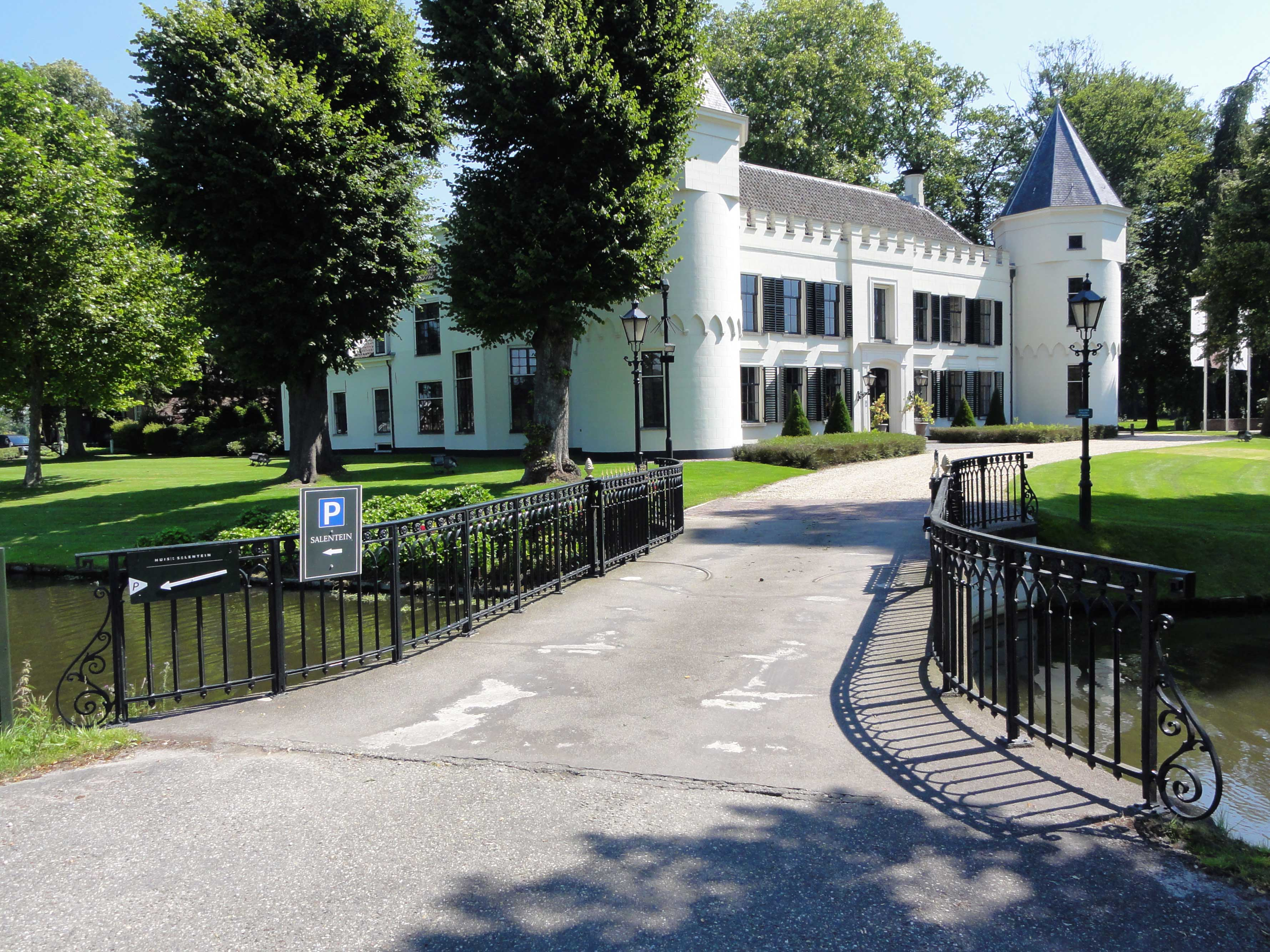 De Salentein nabij Nijkerk